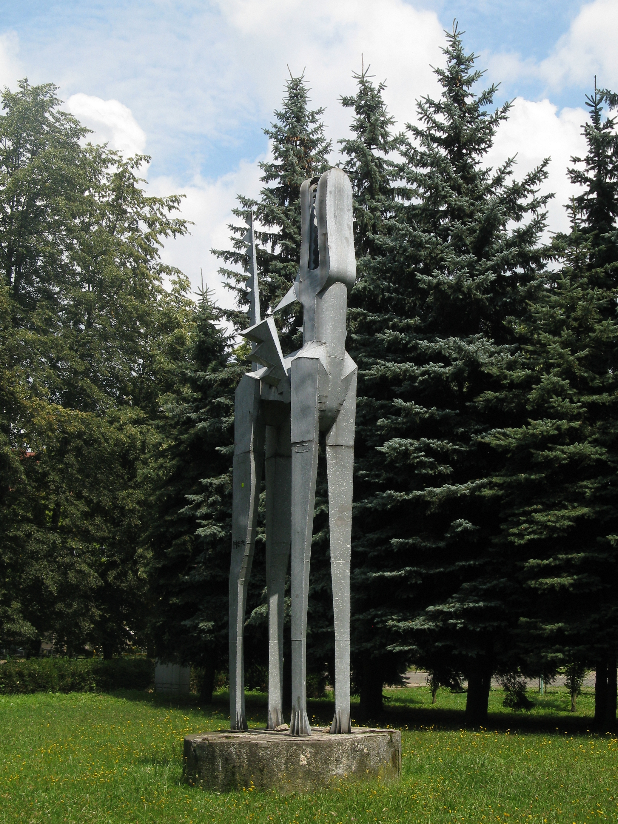 Rzeźba „Pegaz u nas” (oficjalna nazwa, nie pochodząca od autora), projekt: Jacek Wichrowski, lokalizacja: park miejski im. Franciszka Kachla w Bytomiu.